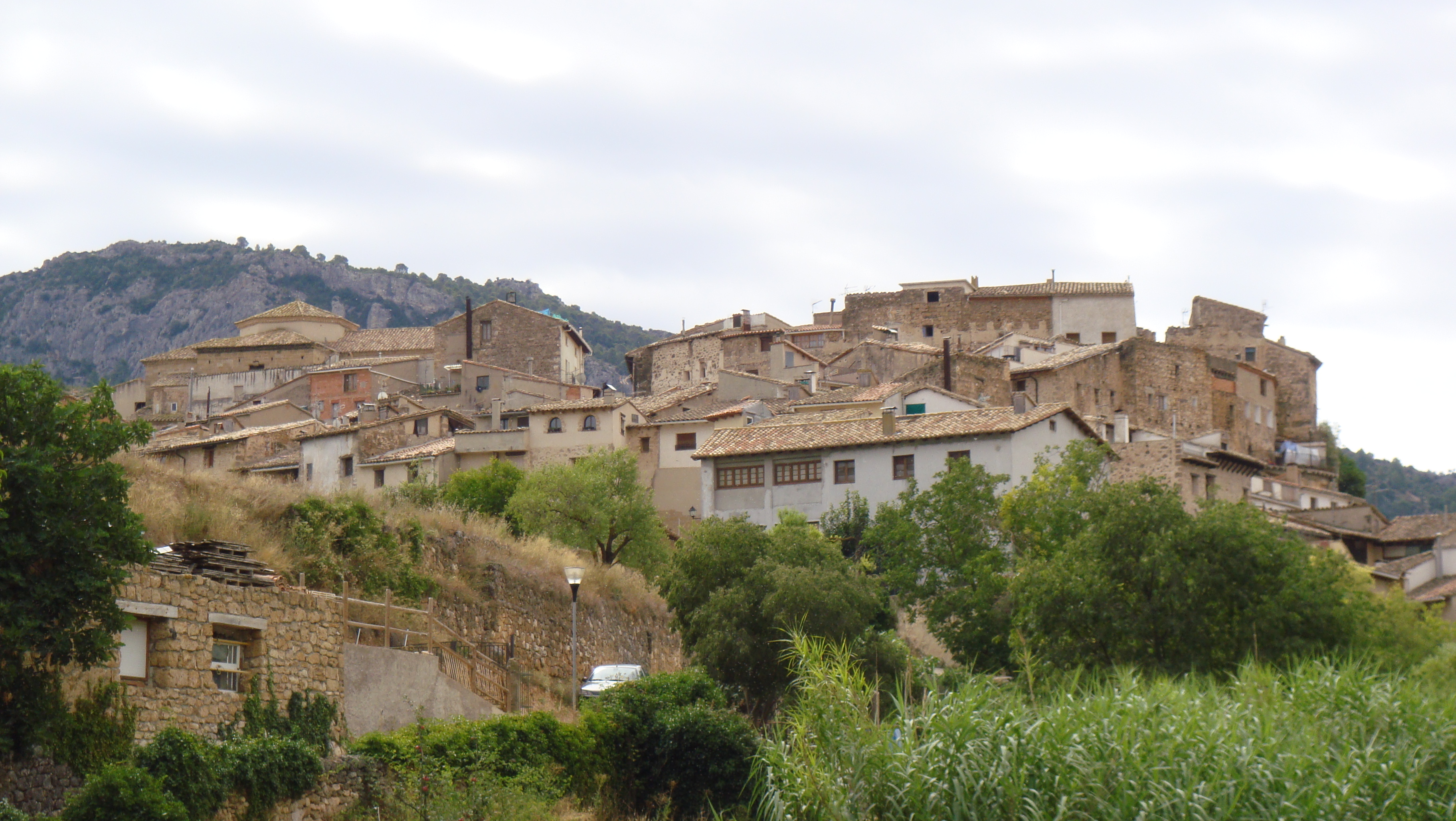 Panorámica del pueblo de Beceite, Teruel (Spain)